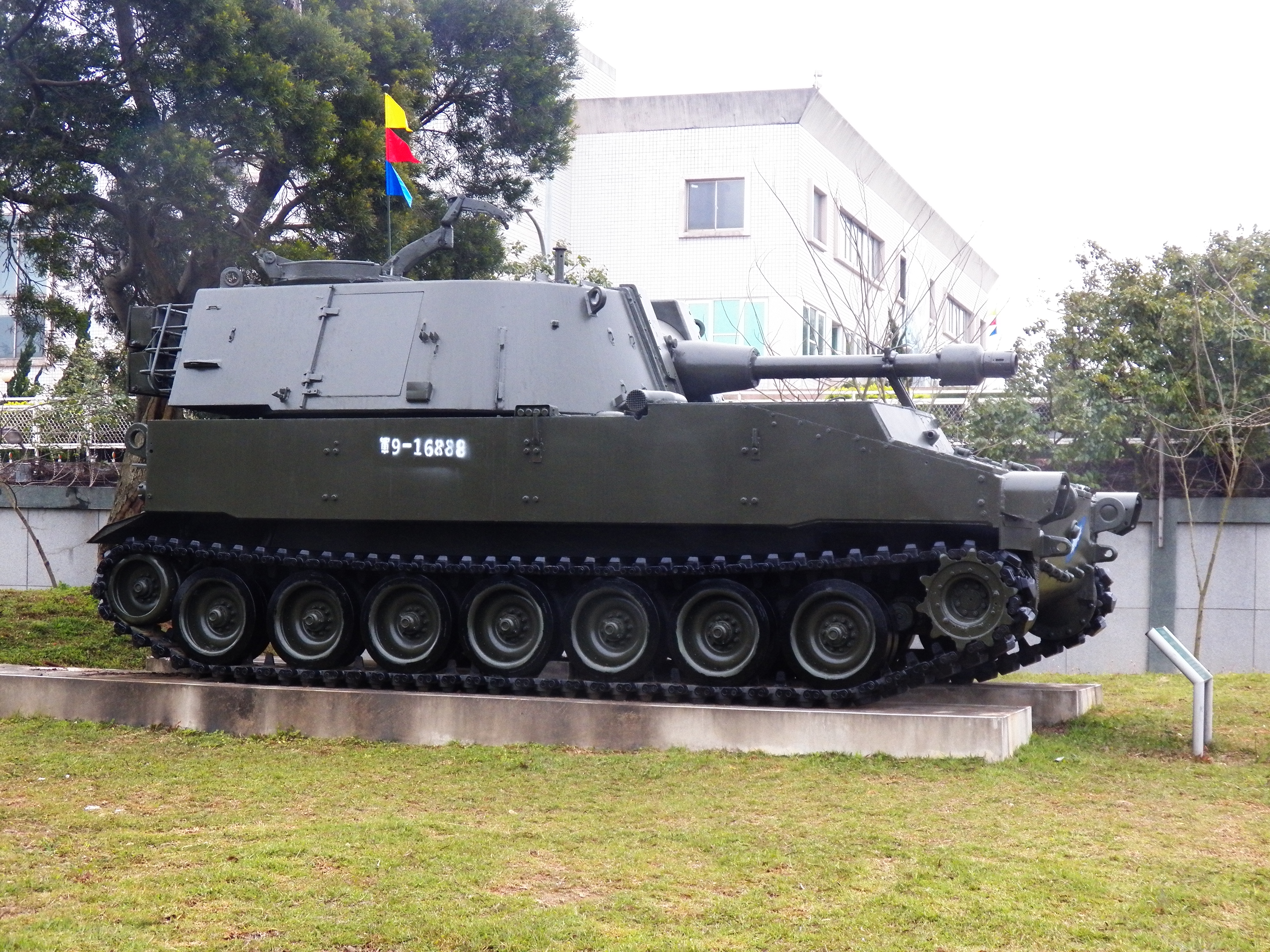 裝甲兵學校操場東北的M108自走榴彈砲右側。